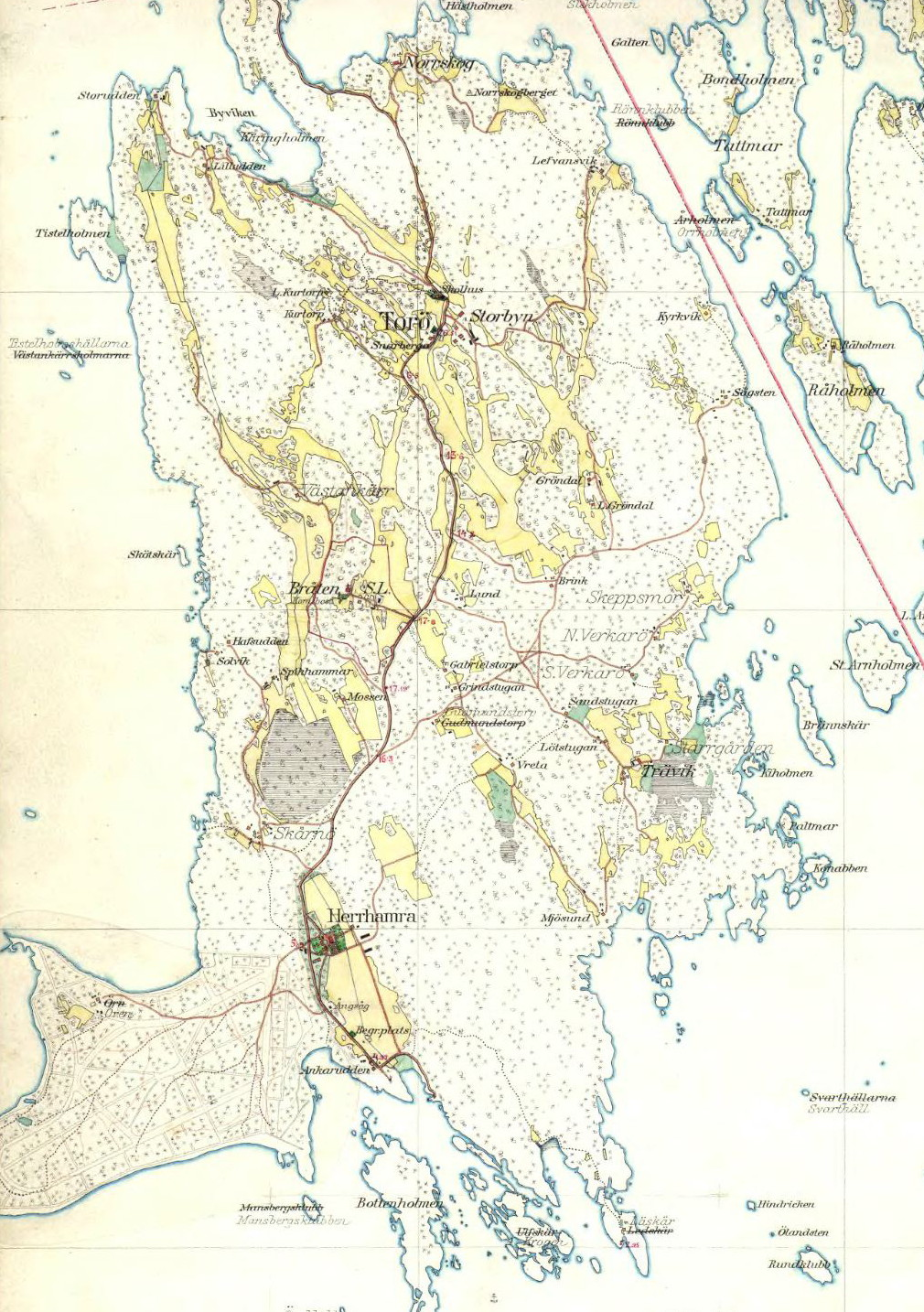 Häradsekonomiska kartan över Torö